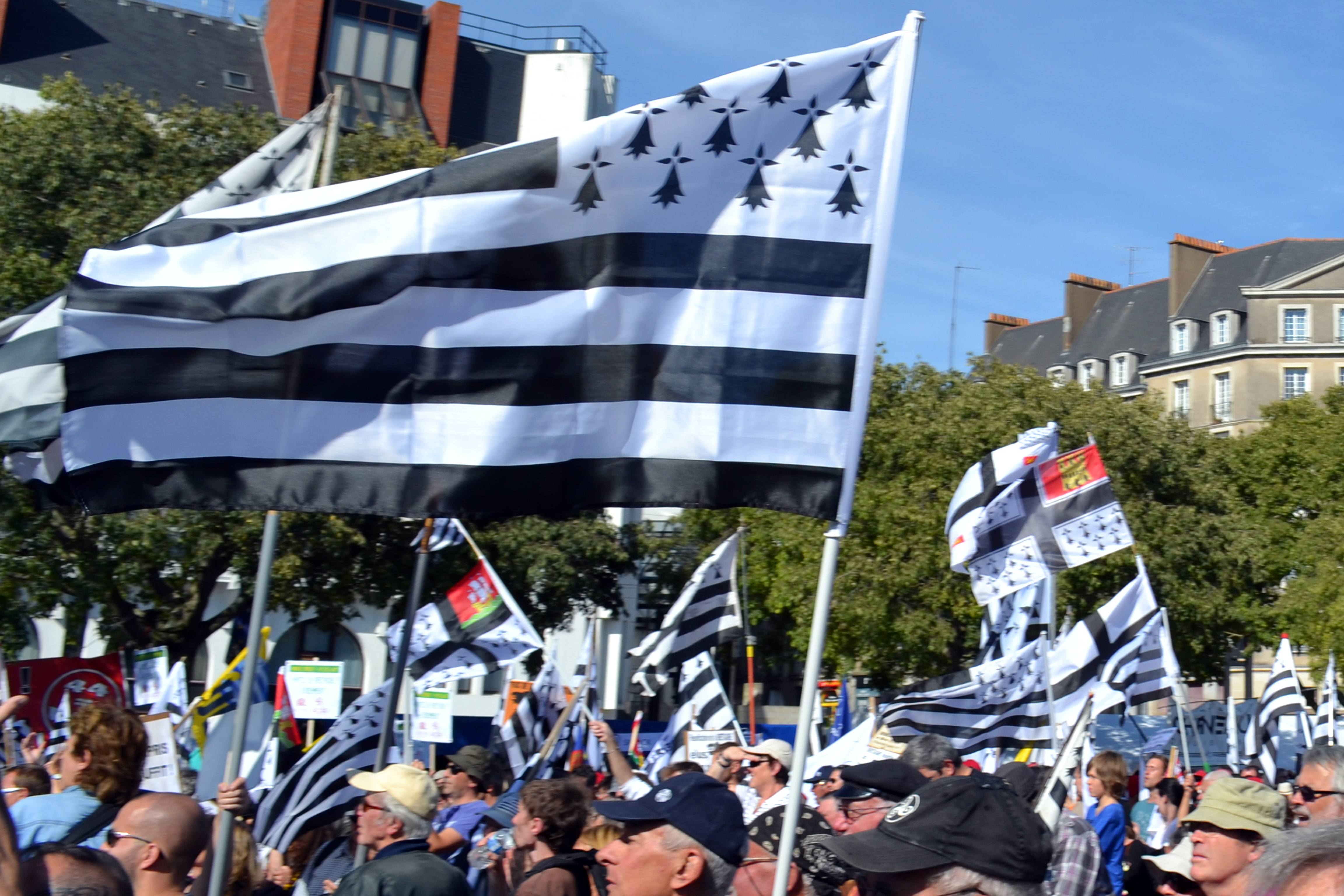 Des milliers de drapeaux bretons brandis à Nantes le 27 septembre 2014 pour célébrer la Bretagne entière et son projet d'avenir commun. La 3e grande manifestation populaire de l'année revendiquait une cohérence territoriale, économique, culturelle, pour que la péninsule plus que millénaire conserve son unité.